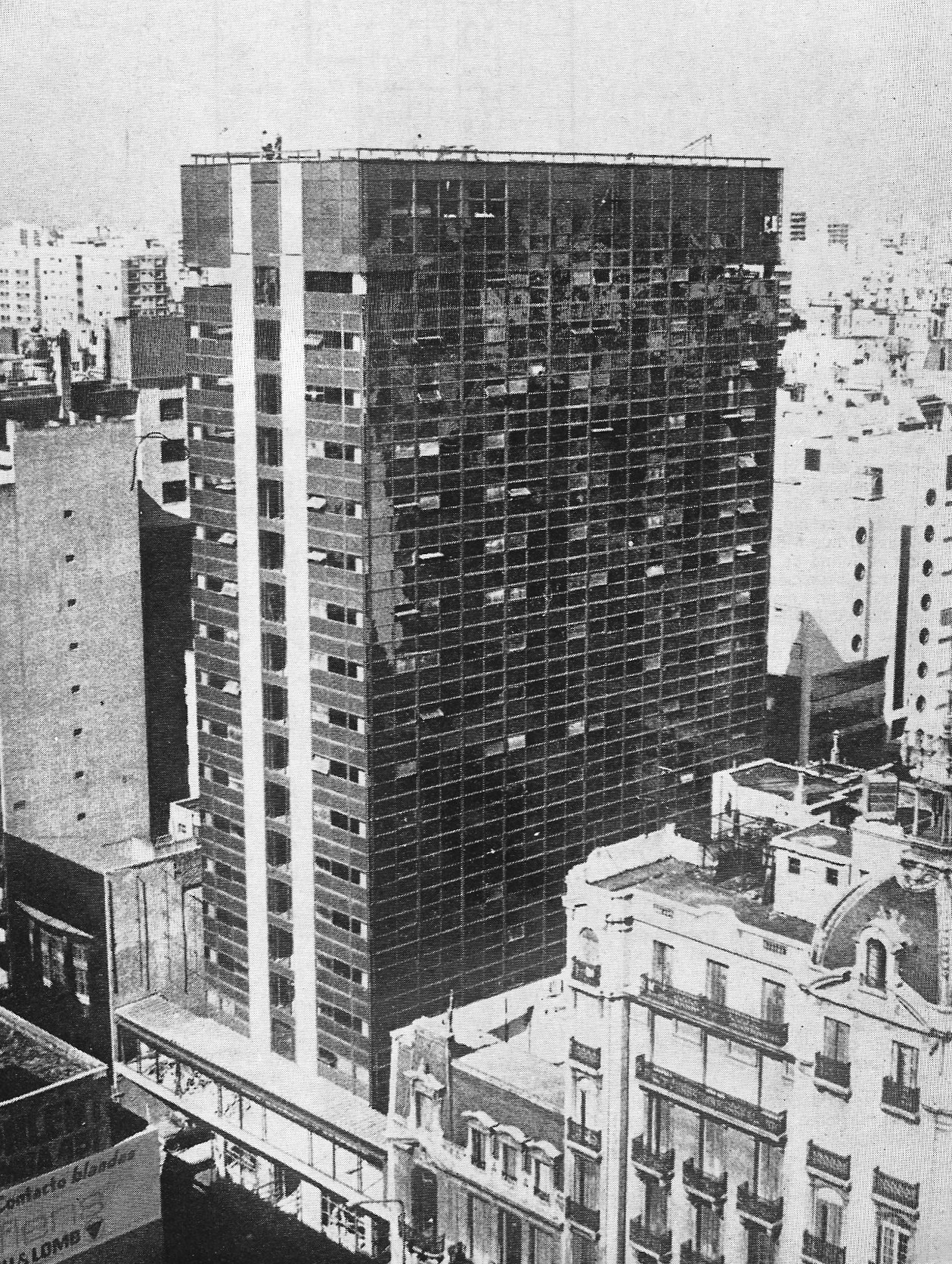 Vista del Hotel BAUEN desde Avenida Callao esquina Avenida Corrientes. Buenos Aires, Argentina. Arquitectos: Parsons, Cortiñas y Ferrari